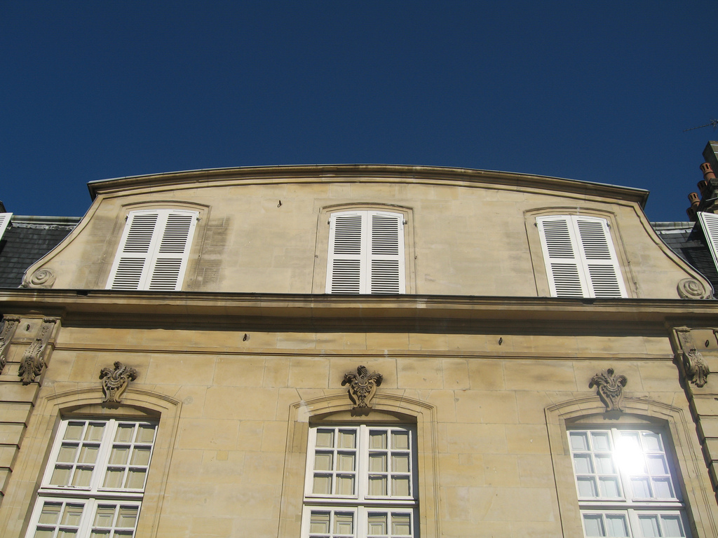 Hôtel de Blangy à Caen : détail du fronton du corps de logis principal